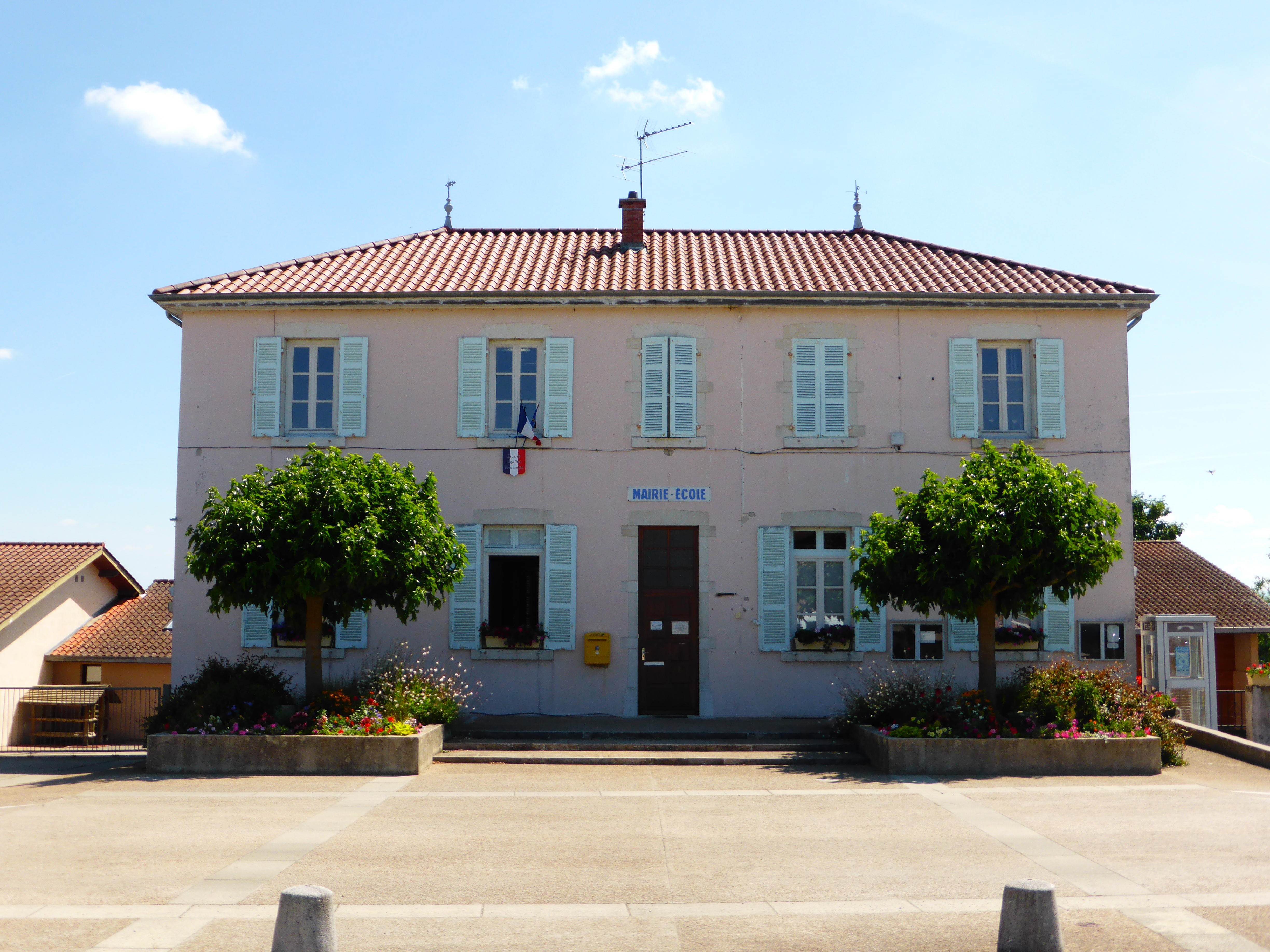 Mairie de Saint-Rémy, dans l'Ain.